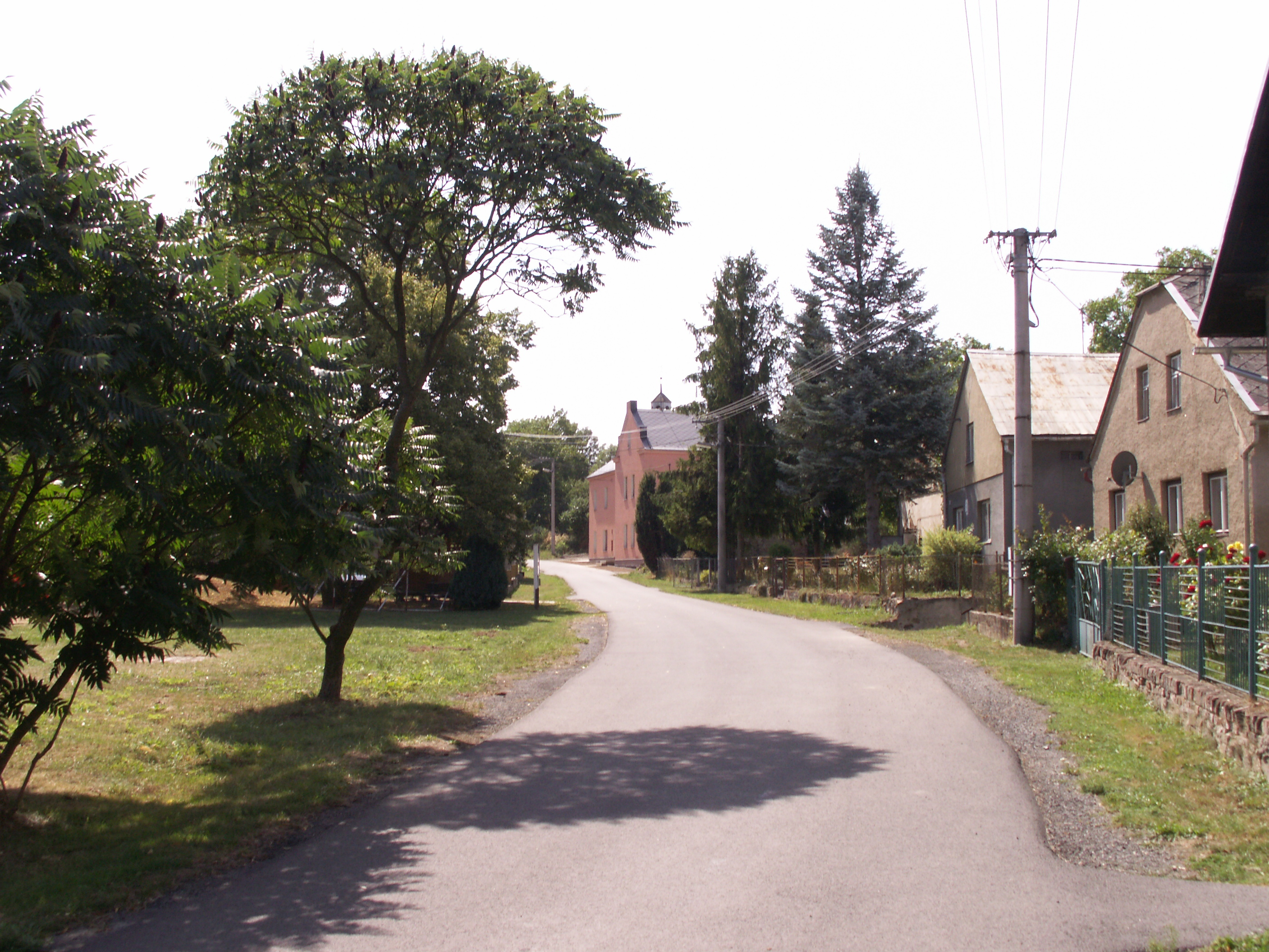 Bartultovice, část obce Vysoká, okres Bruntál, kraj Moravskoslezský